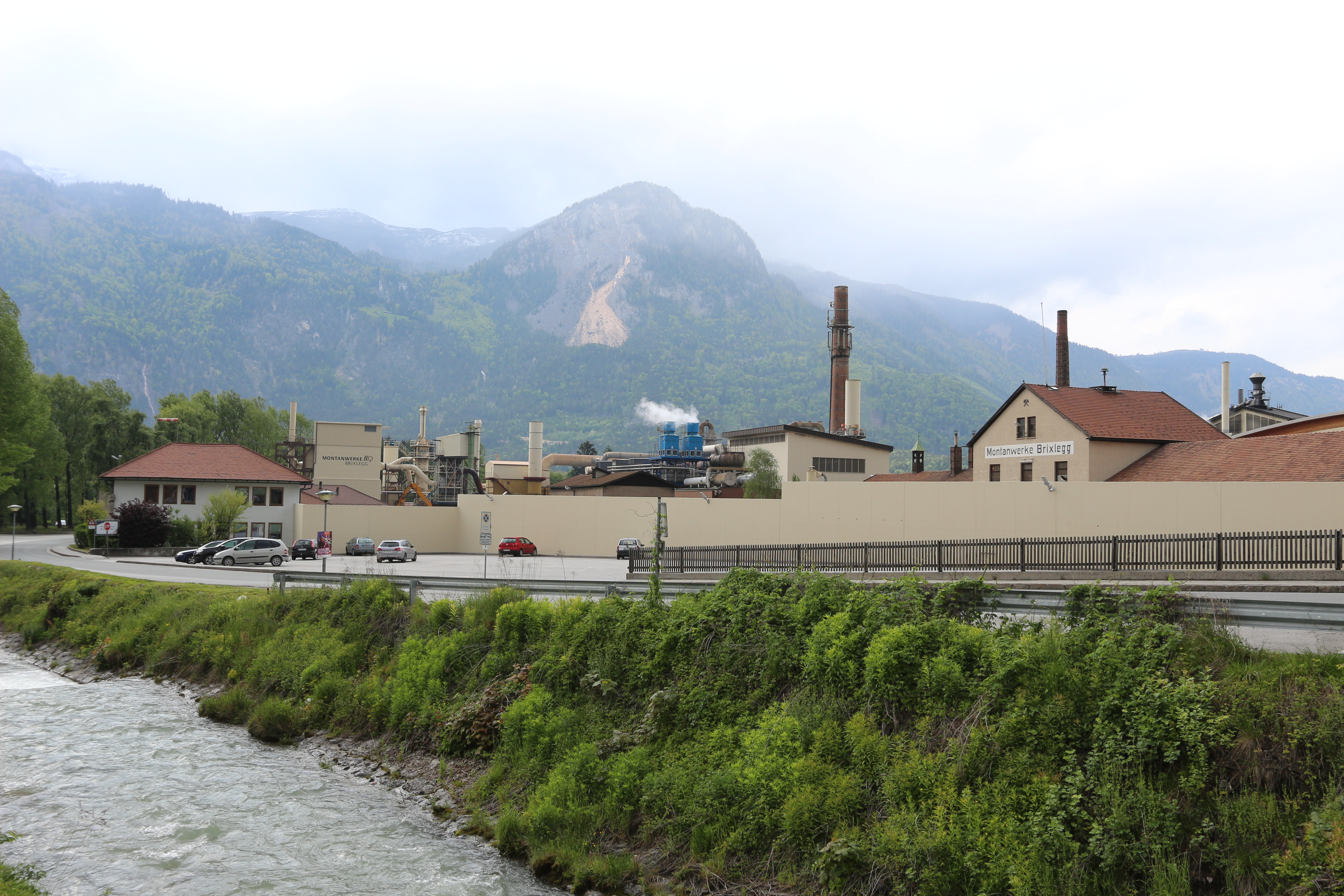 Montanwerke Brixlegg This media shows the remarkable cultural object in the Austrian state of Tyrol listed by the Tyrolean Art Cadastre with the ID 2541. (on tirisMaps, pdf, more images on Commons, Wikidata)